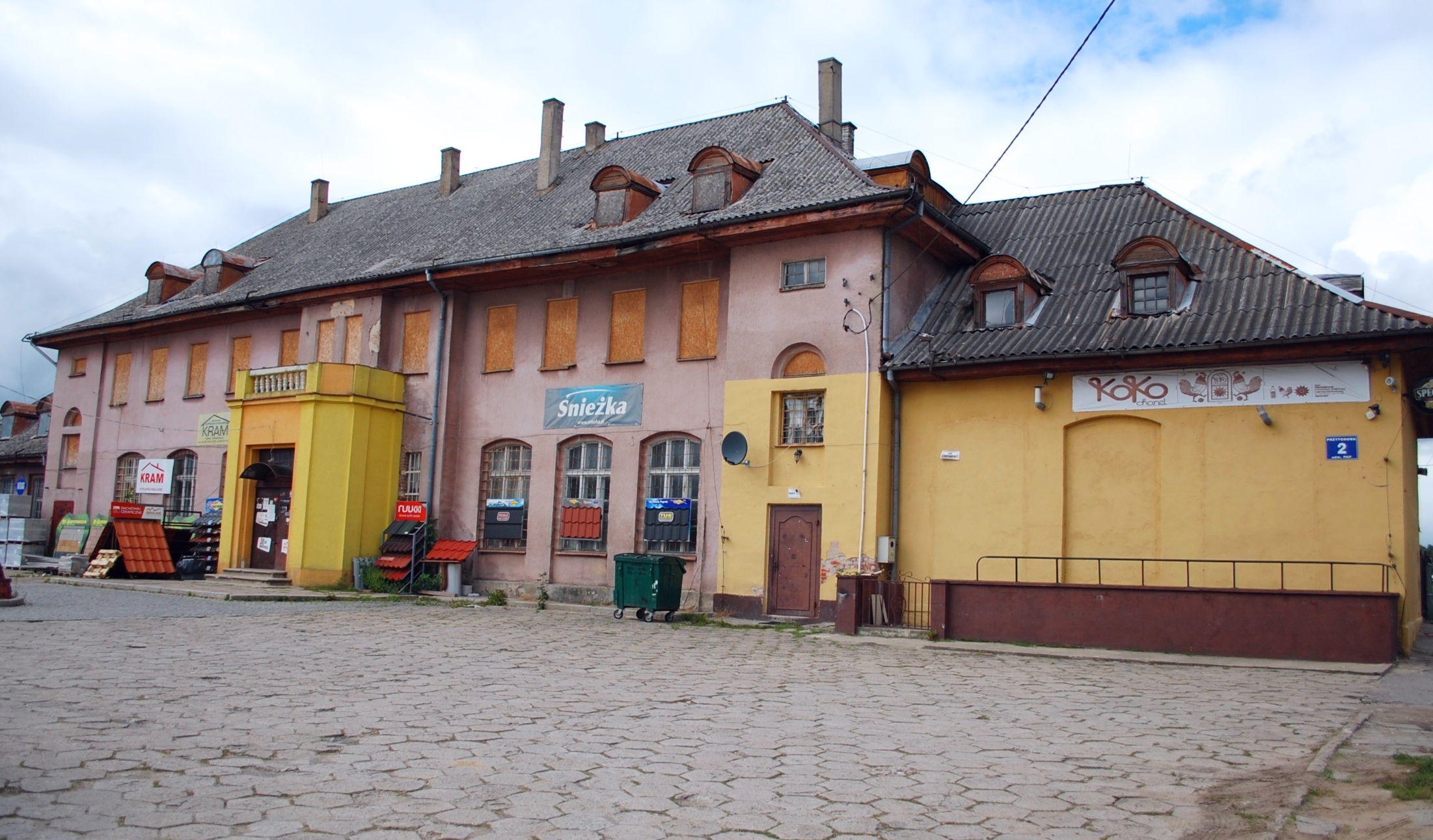 Gołdap - stacja kolejowa